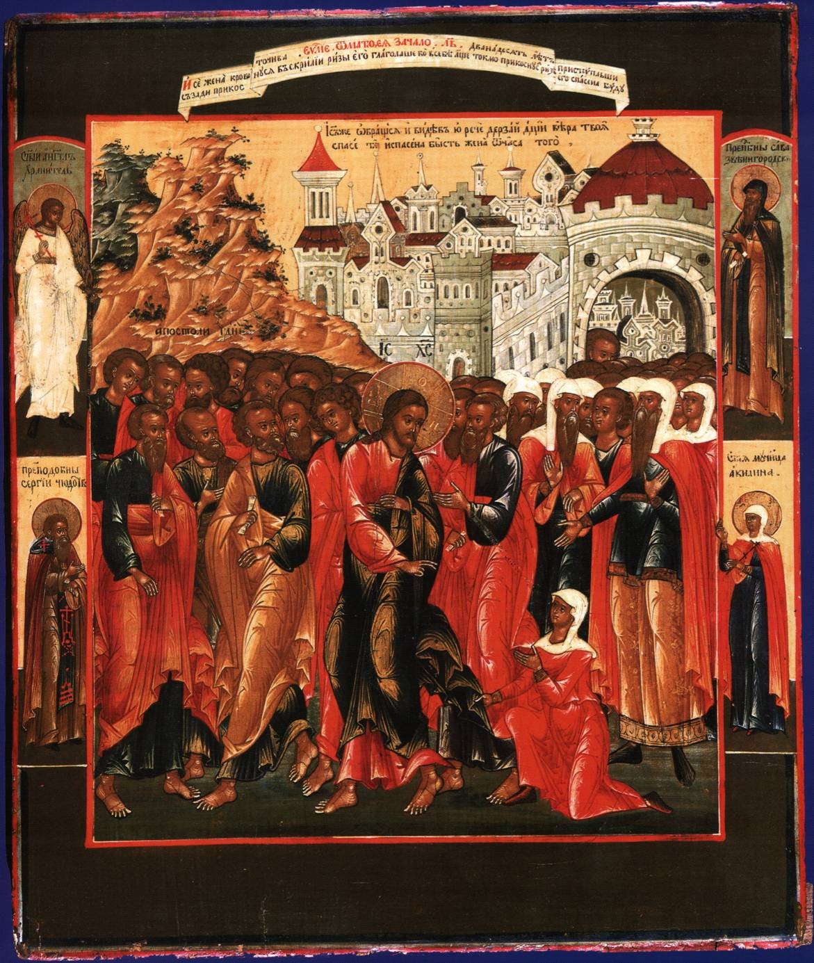 Икона "Исцеление кровоточивой женщины" (кипарисовая доска, левкас, темпера. 39,9х33 см) Композиция с Ангелом-хранителем и тремя святыми на полях